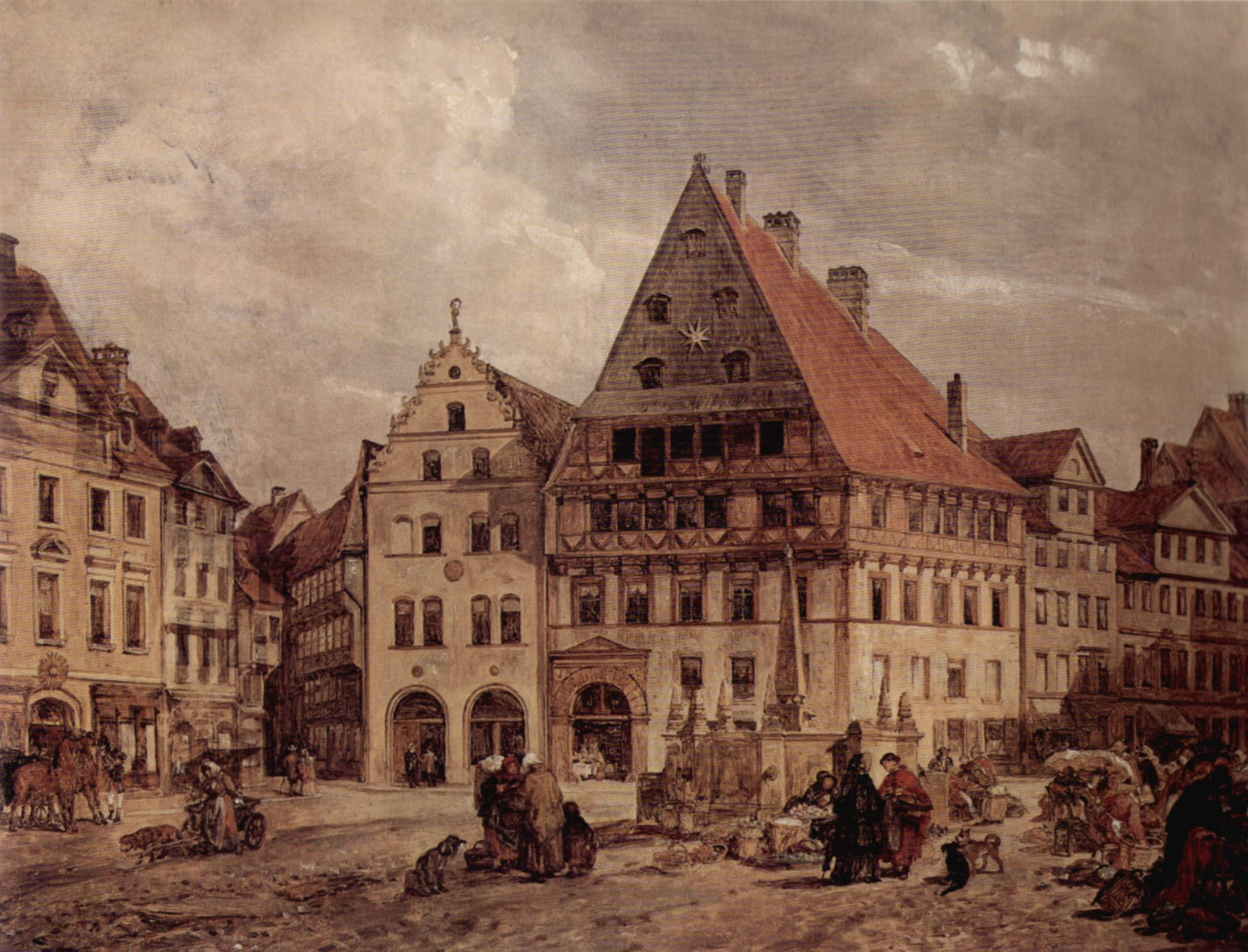 Kohlmarkt in Braunschweig 1894. Zu sehen: Das Haus zur Sonne vor der Umgestaltung der Fassade zum Neorenaissance-Stil, der alte Kohlmarktbrunnen und das Haus zum Stern mit Fachwerk vor dem Umbau zum Massivbau.